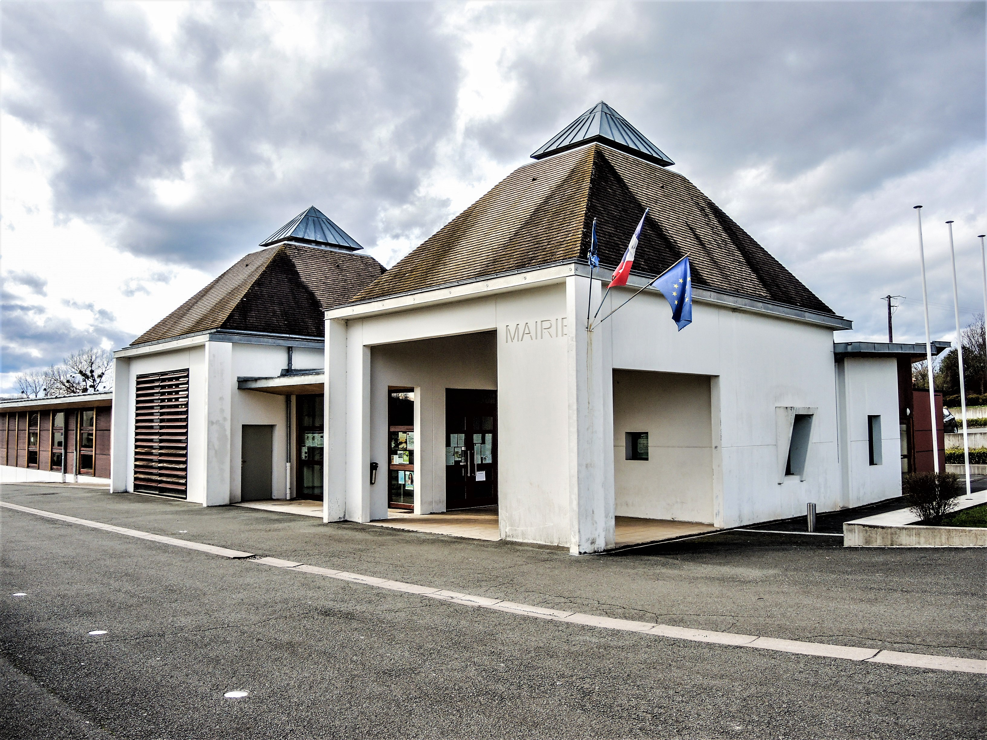 Mairie